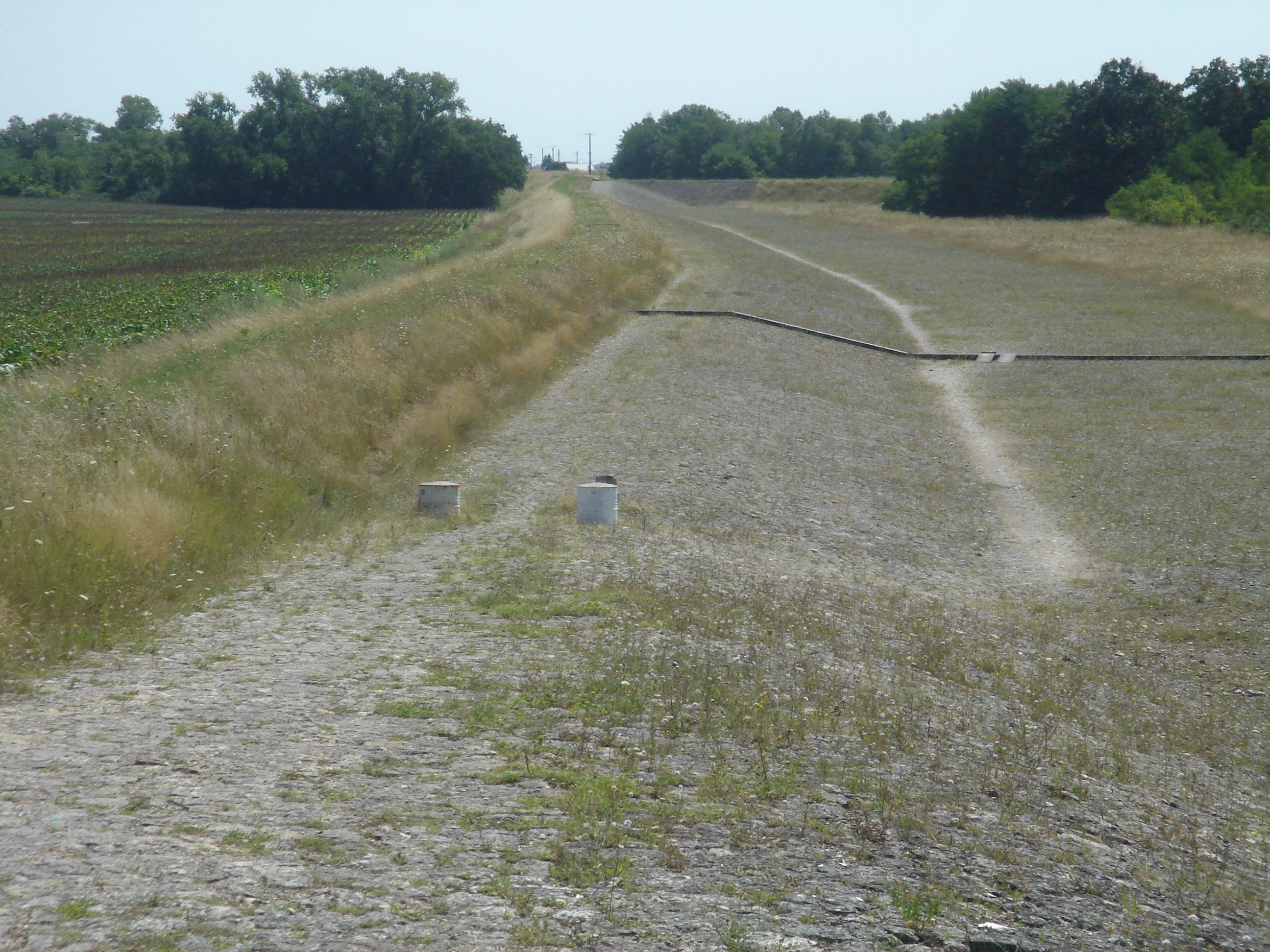 Déversoir, sur la Loire, en amont de Jargeau, Loiret, France. Ouvrage destiné à inonder le val et donc protéger les villes en cas de crue de la Loire.